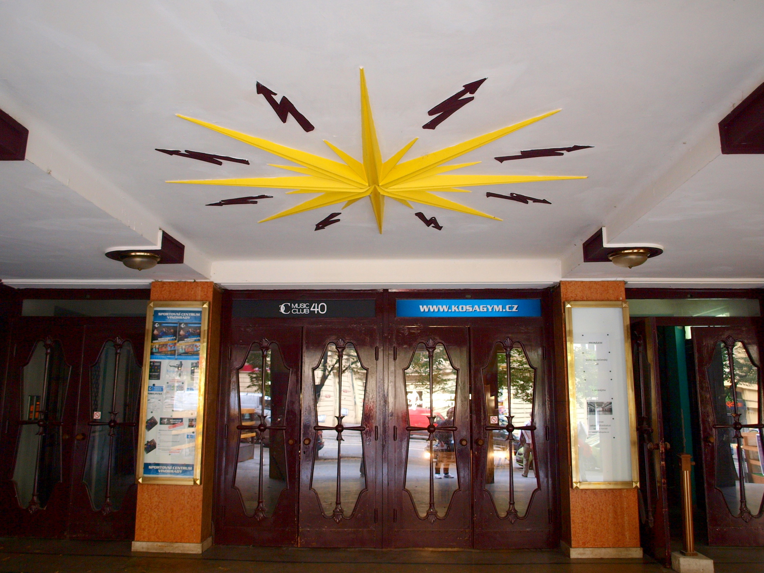 Radiopalác Vinohradská